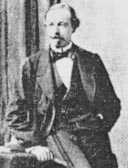 Une photo du Comte Joseph Artur de Gobineau